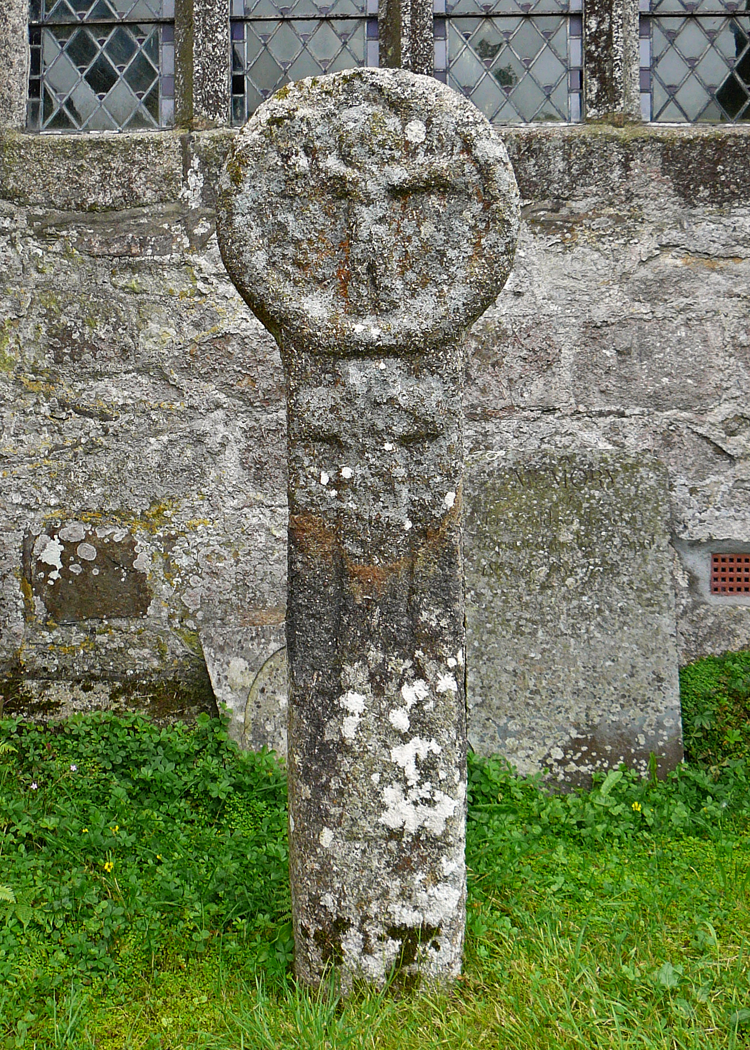 Cross, Gwennap